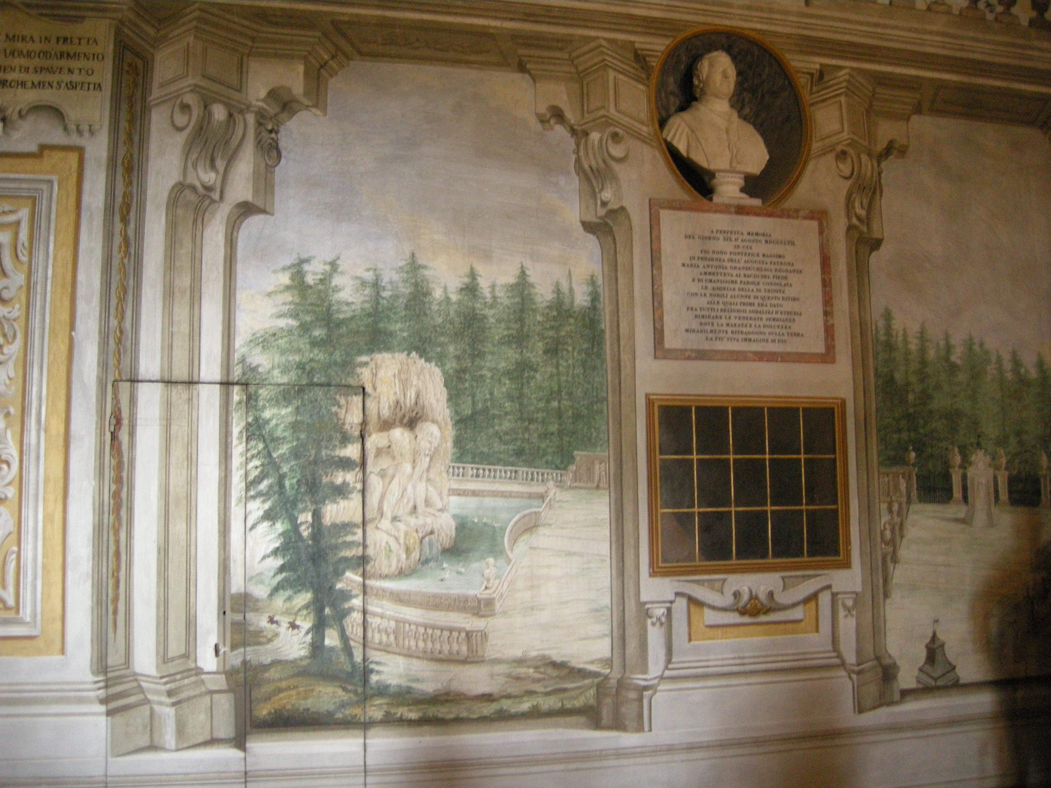 Villa la quiete, parlatoio delle ville medicee 04, pratolino